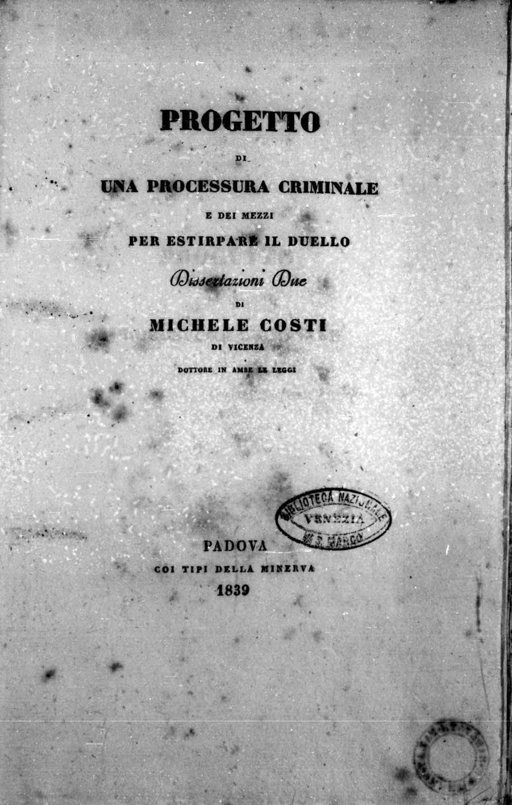 Frontespizio